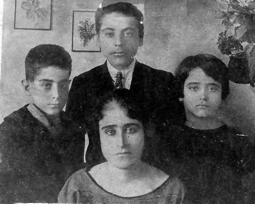 'Alia Menzer and her Children